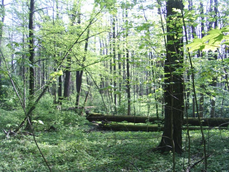 Rezerwat Przyrody Lasek Bielański (Warszawa; Polska)